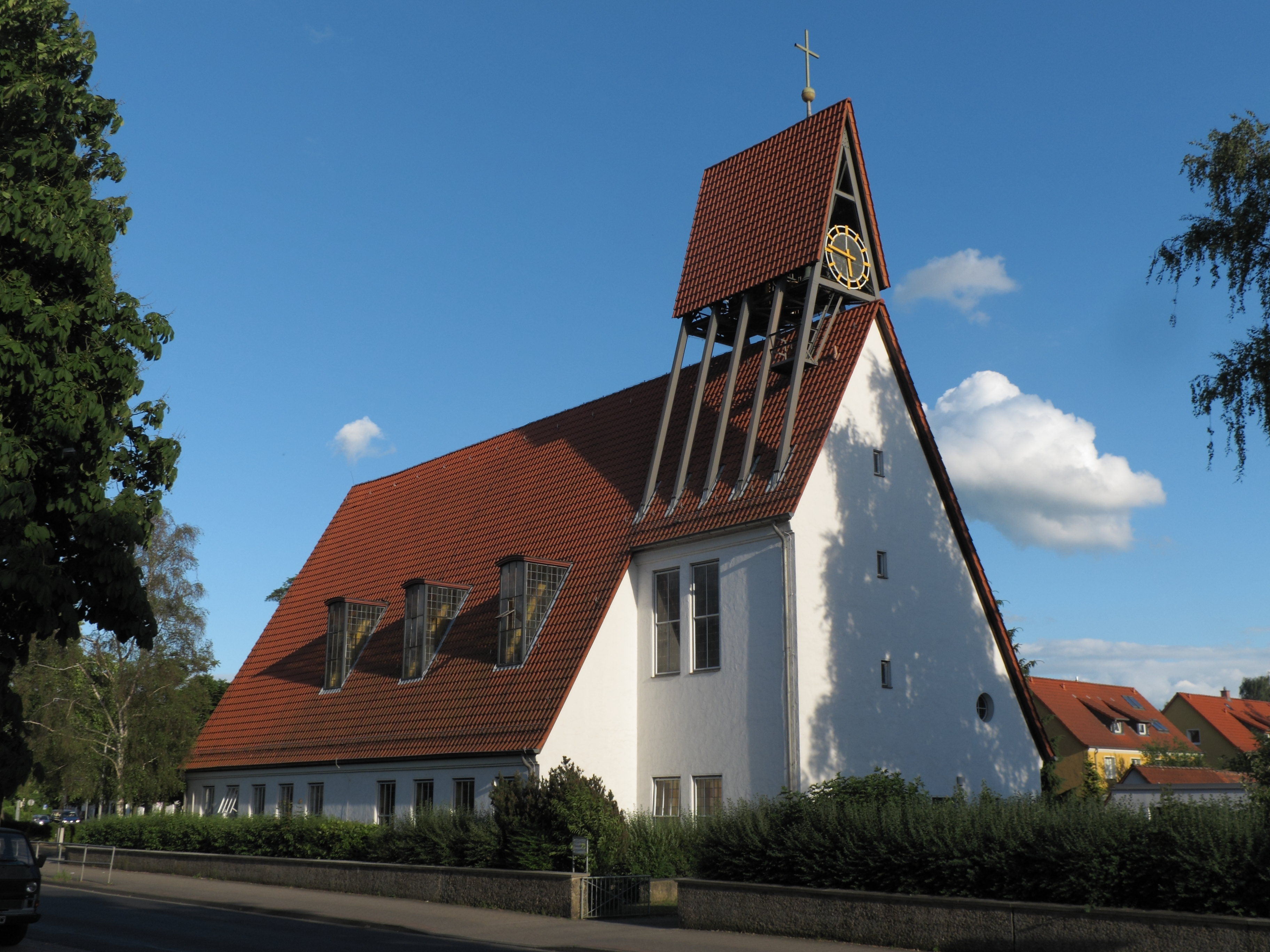 Dankeskirche Braunschweig, Schuntersiedlung, Baujahr 1954